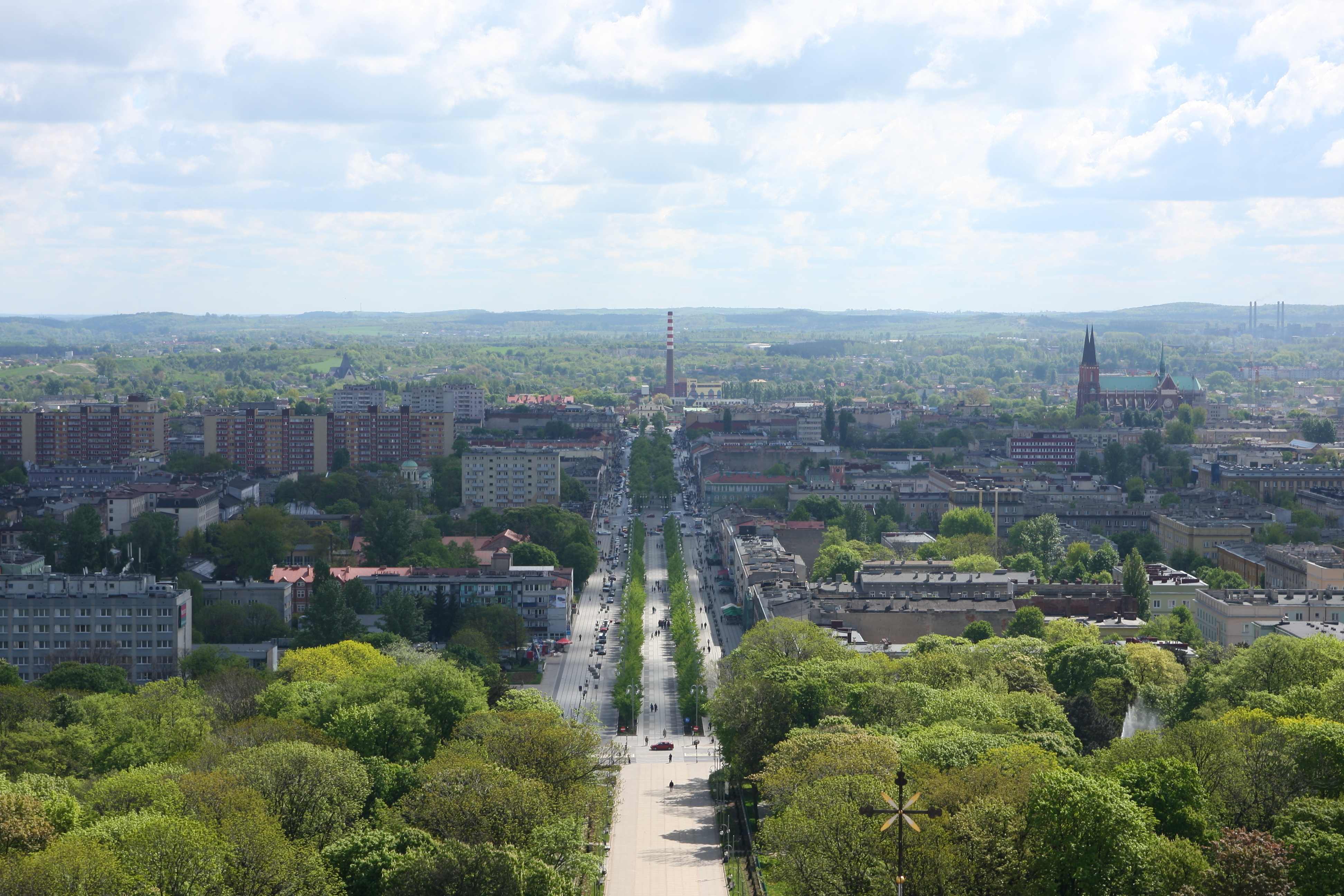 Widok na śródmieście Częstochowy z wieży Jasnogórskiego klasztoru